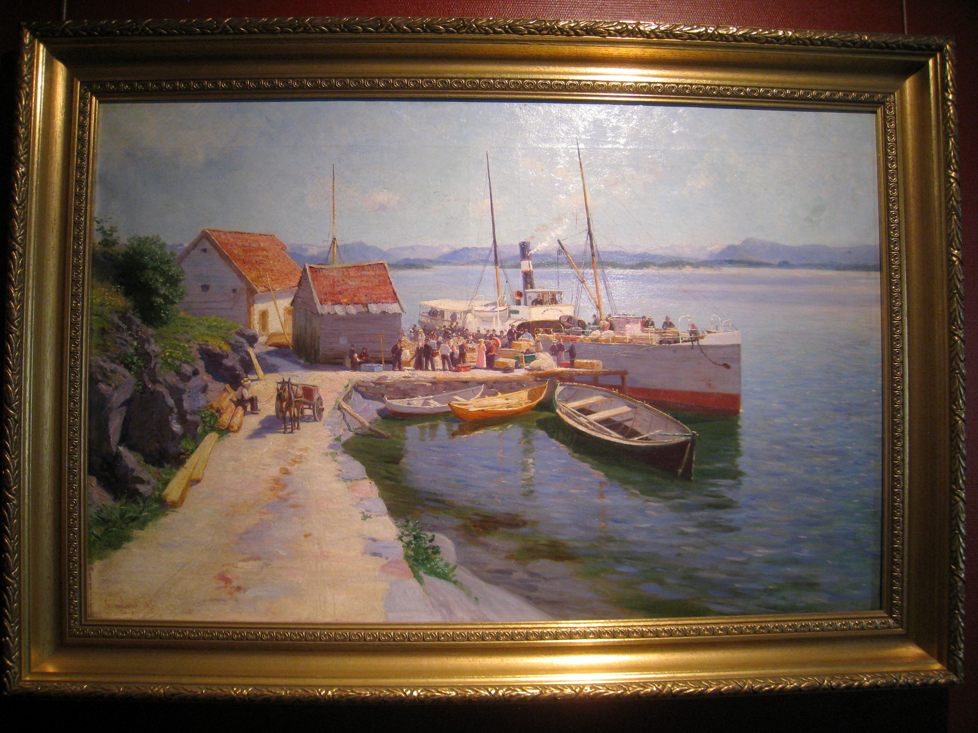 Lokalbåten Ved Kai